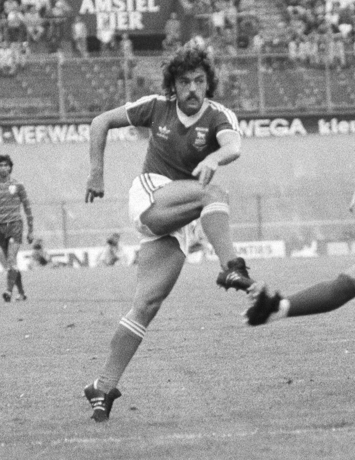 Collectie / Archief : Fotocollectie Anefo Reportage / Serie : Amsterdam 706 toernooi (voetbal) Beschrijving : Finale Ipswich Town tegen Standard Luik (2-0). Wark (rechts) maakt 1-0 Datum : 9 augustus 1981 Locatie : Amsterdam, Noord-Holland Trefwoorden : doelpunten, voetbal, wedstrijden Persoonsnaam : Wark, John Fotograaf : Dijk, Hans van / Anefo Auteursrechthebbende : Nationaal Archief Materiaalsoort : Negatief (zwart/wit) Nummer archiefinventaris : bekijk toegang 2.24.01.05 Bestanddeelnummer : 931-6178